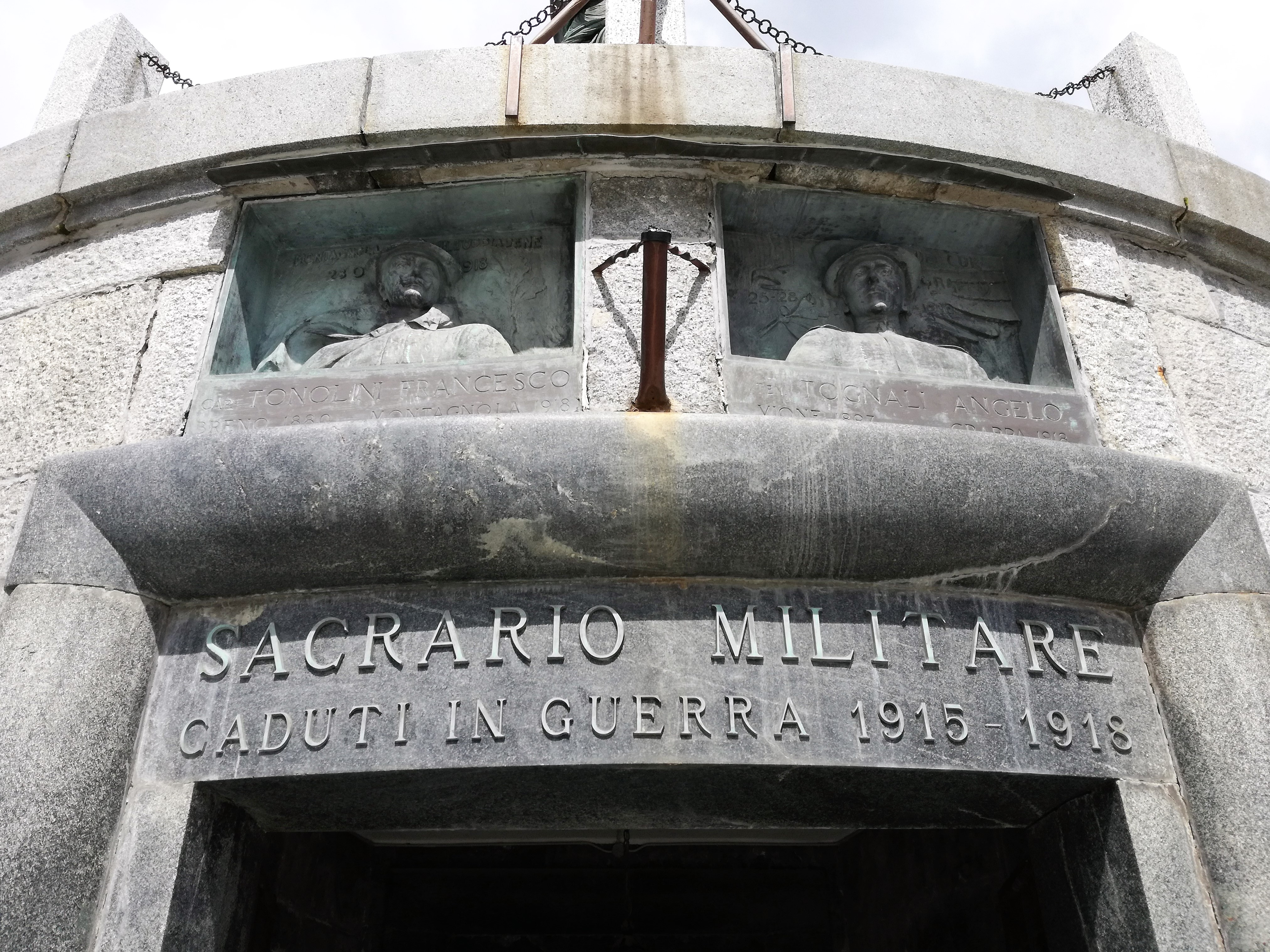 Kriegerdenkmal Tonalepass - Details Eingang